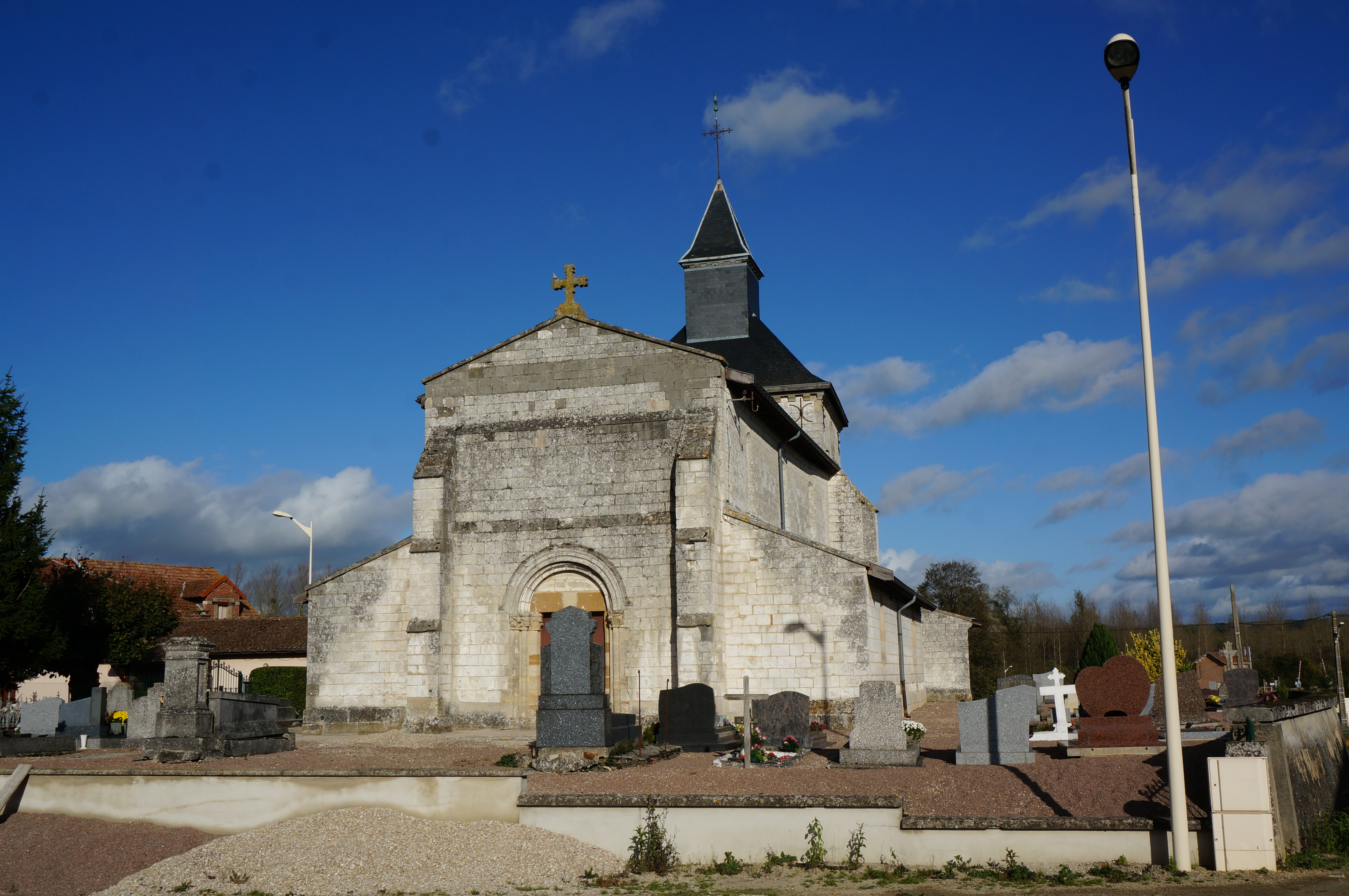 Vue de l'église .